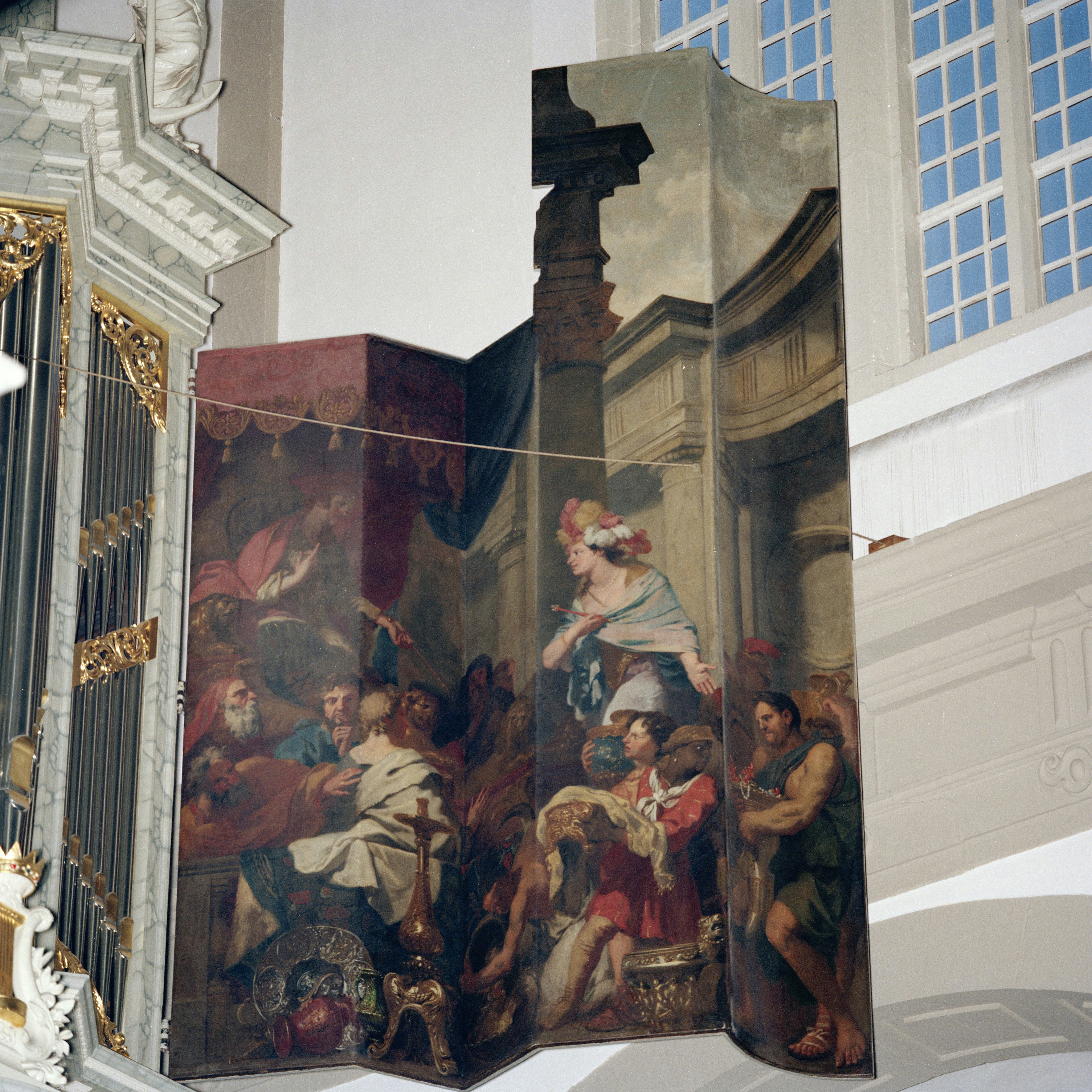 Westerkerk: Interieur, orgel, detail : binnenzijde van het rechter hoofdwerkluik, 'De Koningin van Scheba bezoekt Koning Salamo'. Vervaardiger: Gerard de Lairesse, 1686 (opmerking: Gemaakt voor het boek 'Orgelluiken' (Mieke M. van Zanten, 1999))